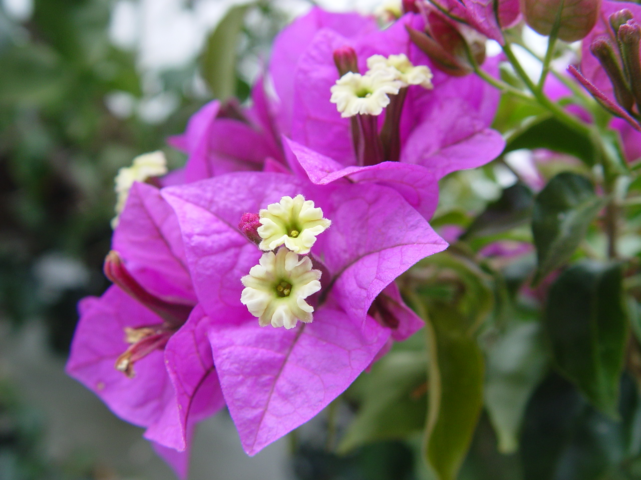 Bougainvillea glabra (Familiy: Nyctaginaceae)